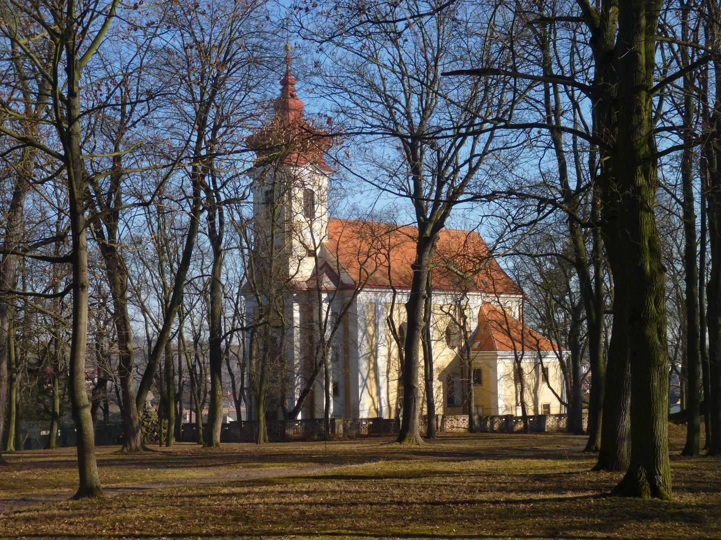 Kostel Zvěstování P. Marie (Břežany), na kopci nad obcí, u zámku, Břežany